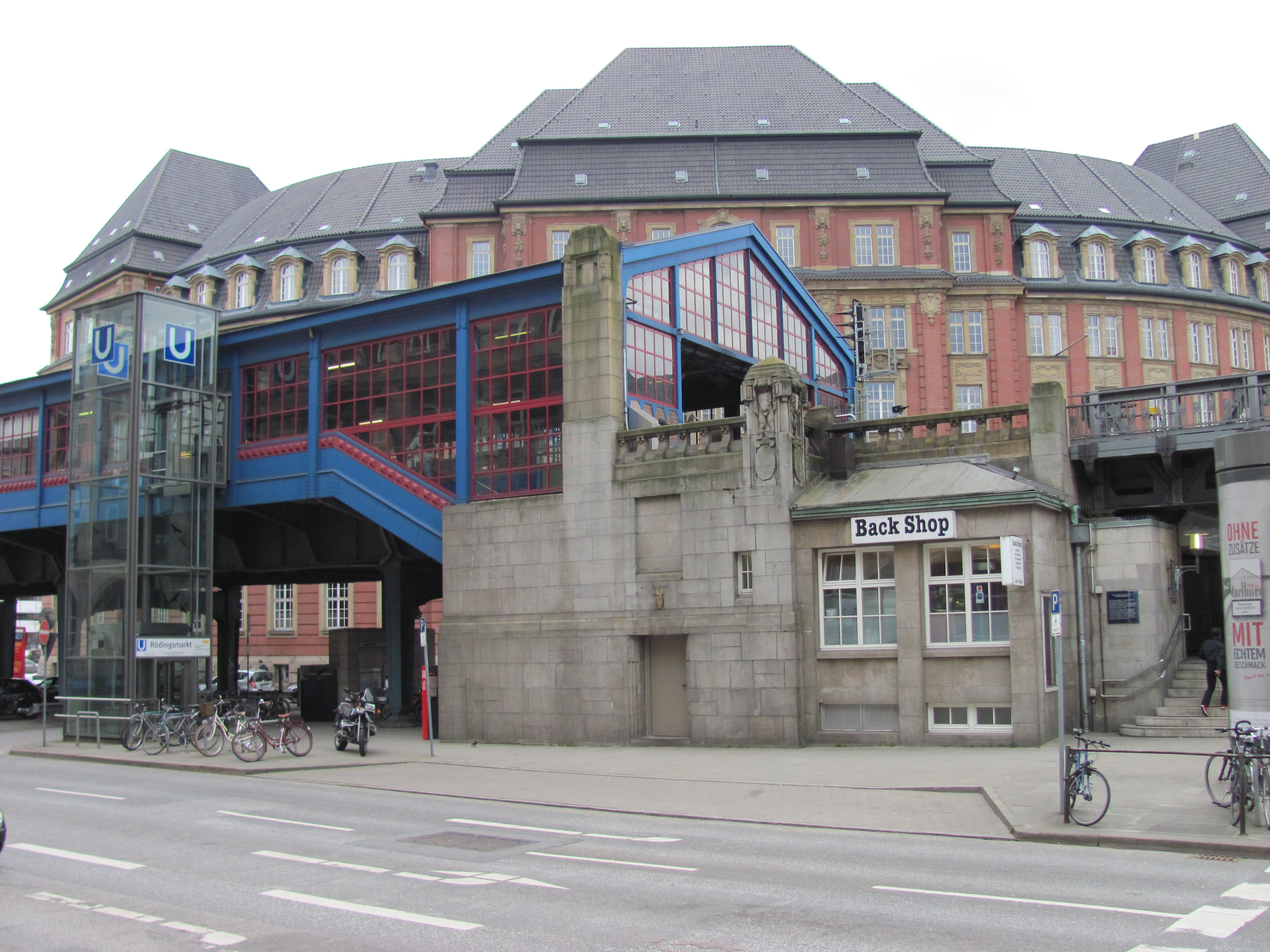 U-Bahnhof Rödingsmarkt, Nordeingang. Die Pfeiler-Figuren wurden 1911 vom deutschen Bildhauer Wilhelm Rex geschaffen.